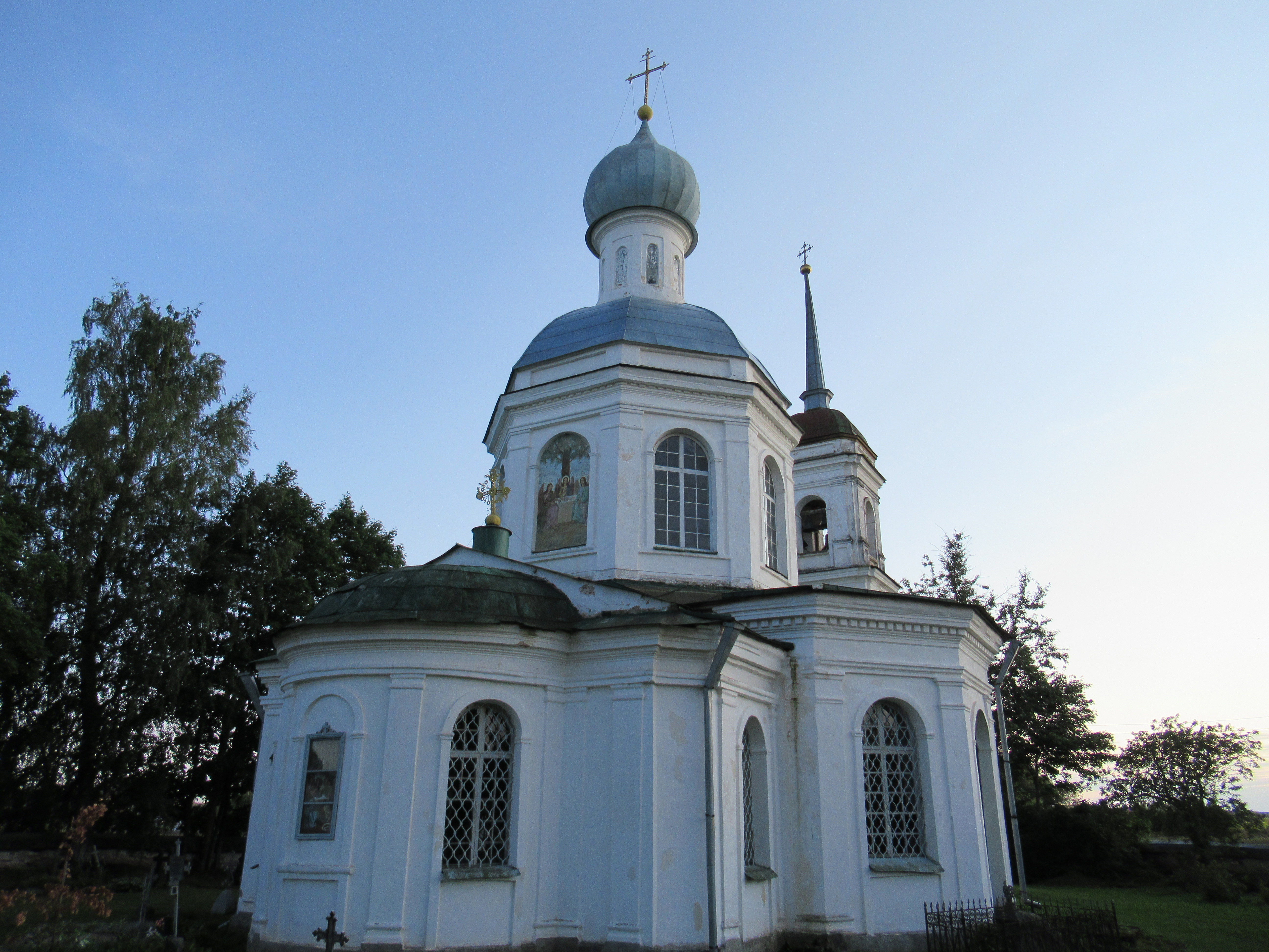 Zalesje Kolmainu kirik